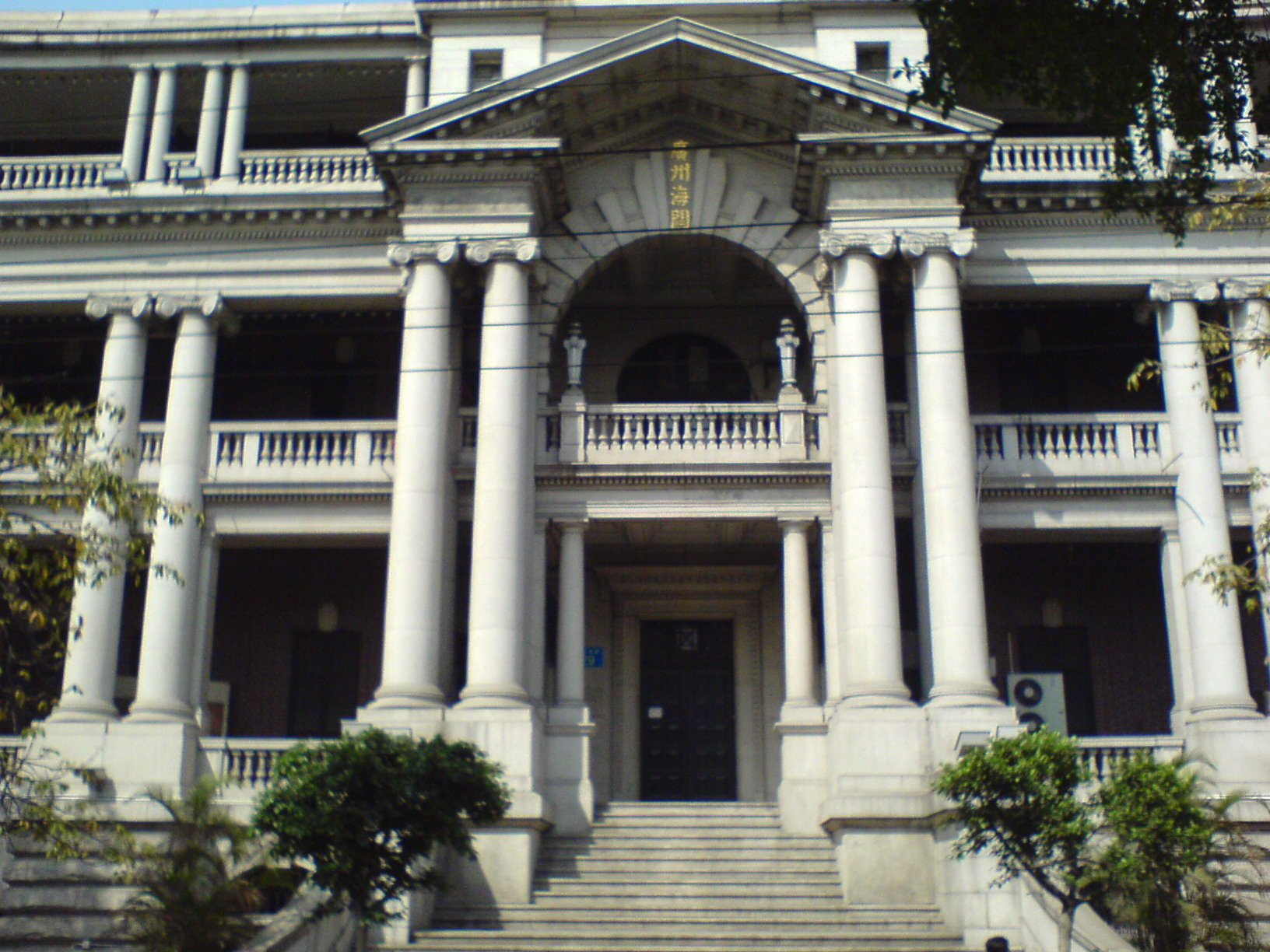 廣州市沿江西路粵海關舊址。大樓多處字跡在文化大革命期間被破壞，以水泥覆蓋。